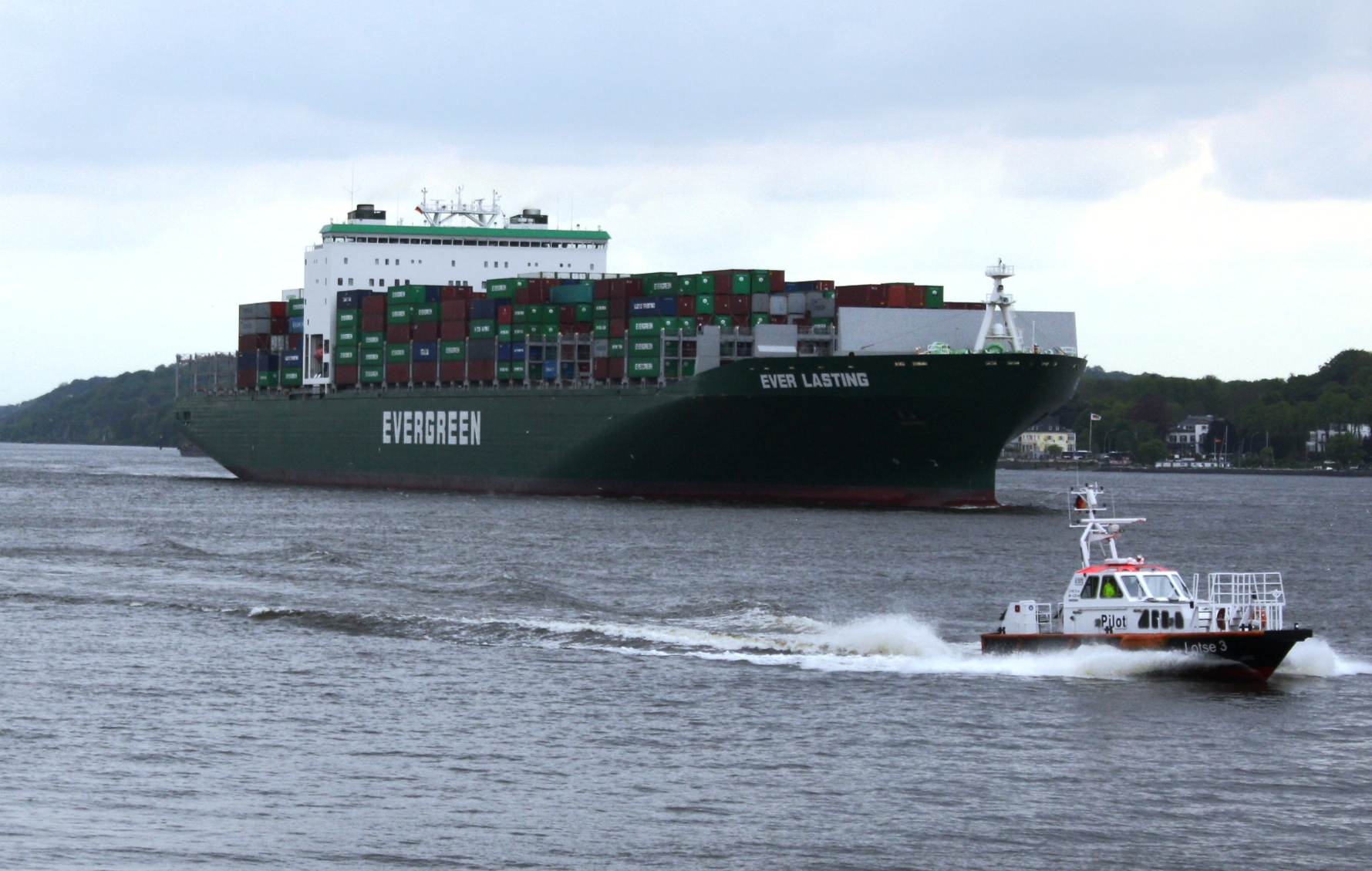 Die Ever Lasting bei der Einfahrt in den Hamburger Hafen.